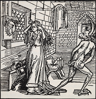 Der Ritter vom Turn. Basel: Michael Furter für J[ohann] B[ergmann], 1493. Reprint: Kautzsch, Rudolf. Die Holzschnitte zum Ritter vom Turn (Basel 1493). Strasbourg: Heitz & Mündel, 1903.